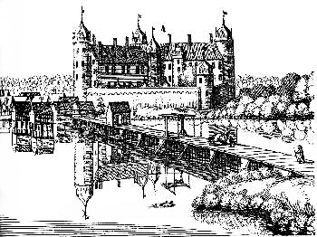 Ausschnitt aus dem Kupferstich "Cöpenick" von Caspar Merian, 1652: Ansicht des Köpenicker Renaissance-Jagdschlosses (1558 erbaut) und der Langen Brücke („Seufzerbrücke“/Dahme-Überwegung).